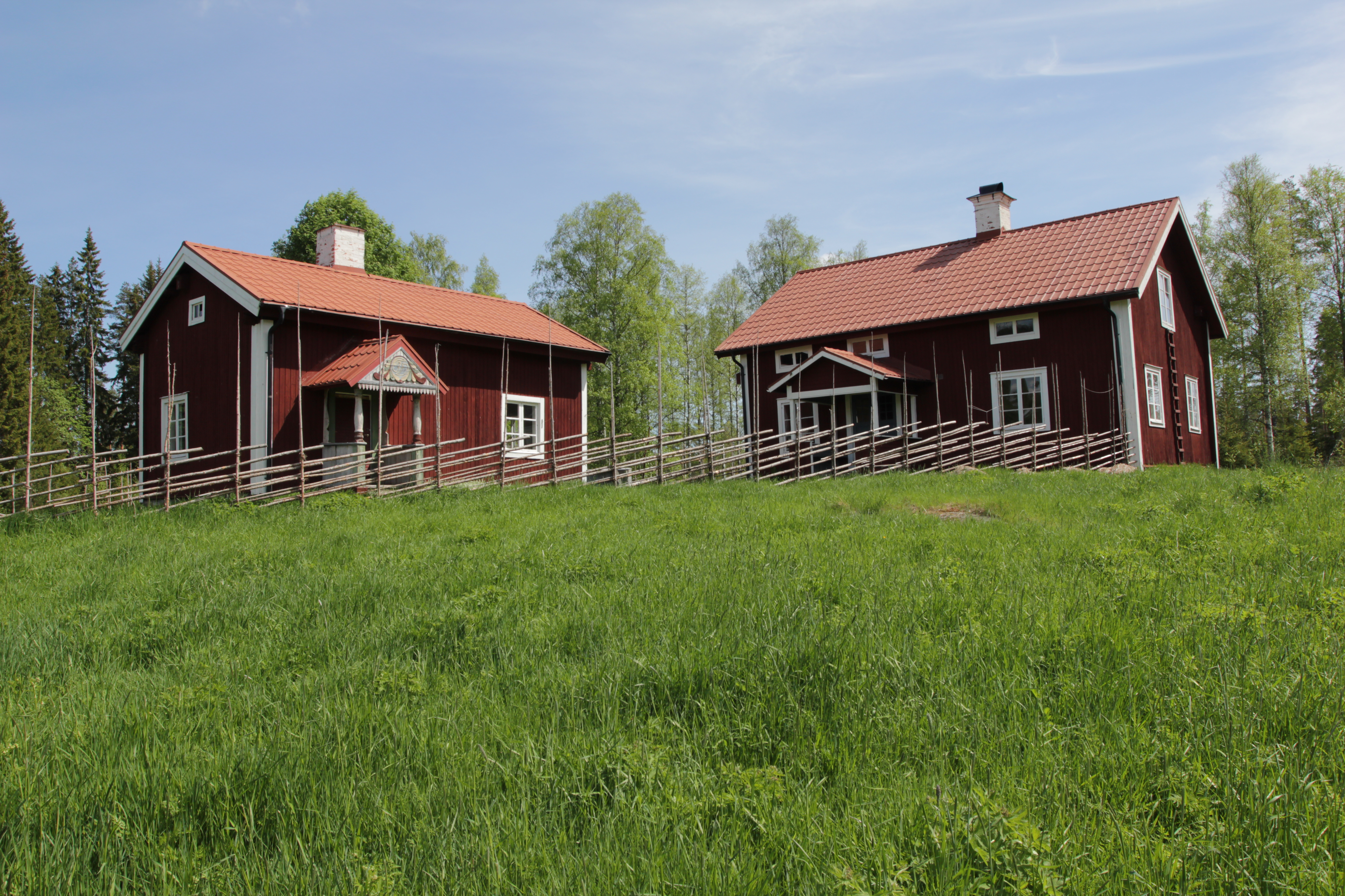 Gården Sotbo, nära Norns bruk, Hedemora kommun, Sverige. Inspelningsplats för dokusåpan Farmen.